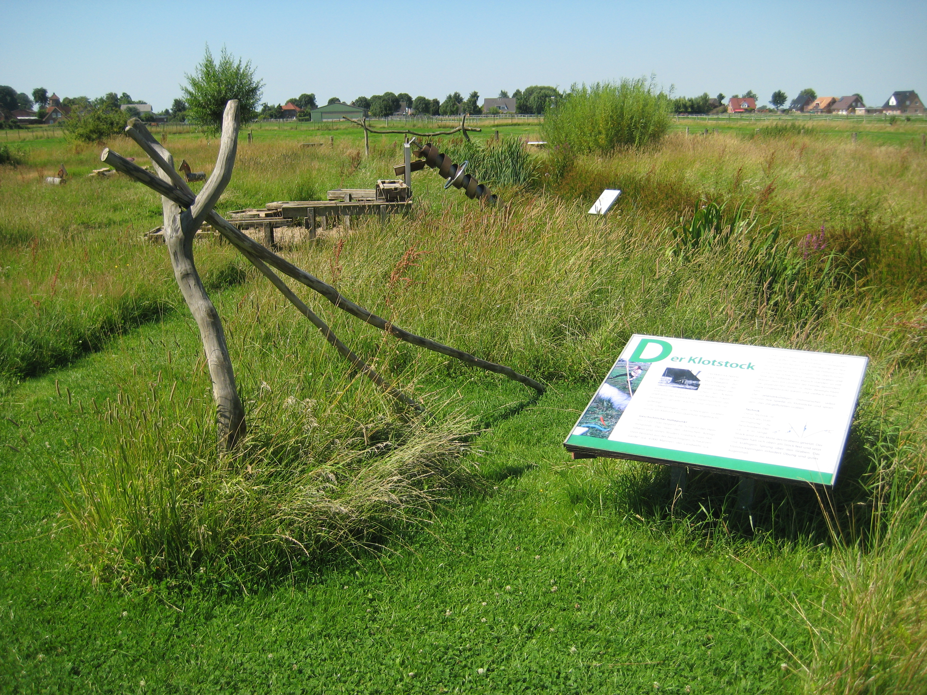 Naturerlebnisraum Elbmarschenhaus in Haseldorf